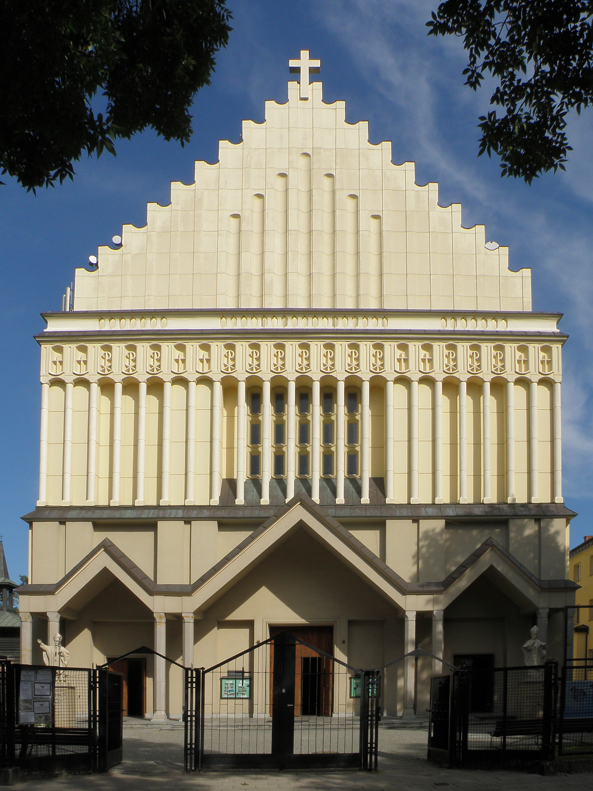 Kościoł św. Andrzeja Boboli, ul. Alfreda Nobla 16 w Warszawie - nr 956 A z 13.06.1979 - parafia Matki Bożej Nieustającej Pomocy